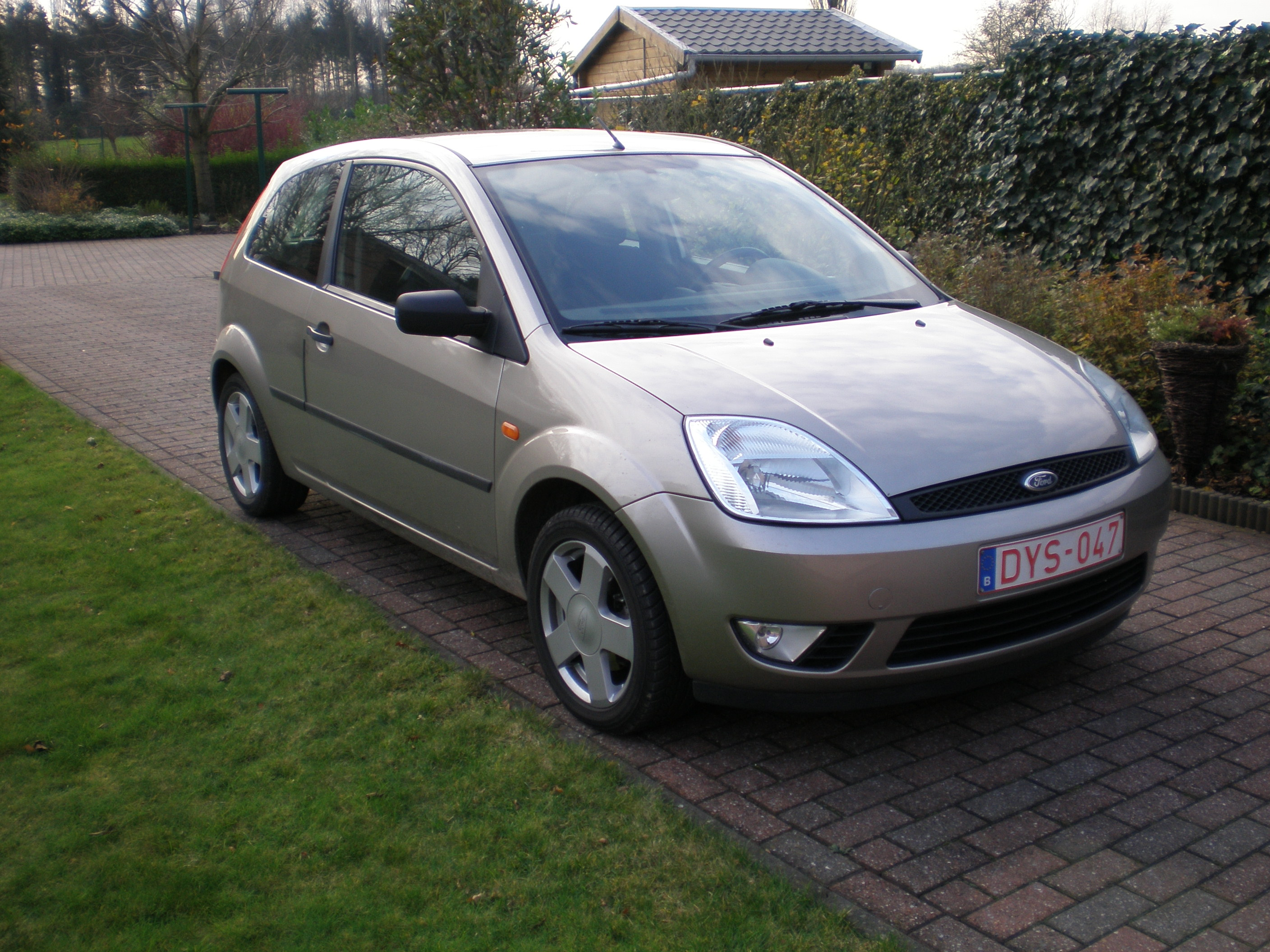 2004 Ford Fiesta 3-door Right-Front taken in Belgium.